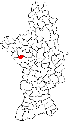 Categorie:Hărţi ale judeţului Olt